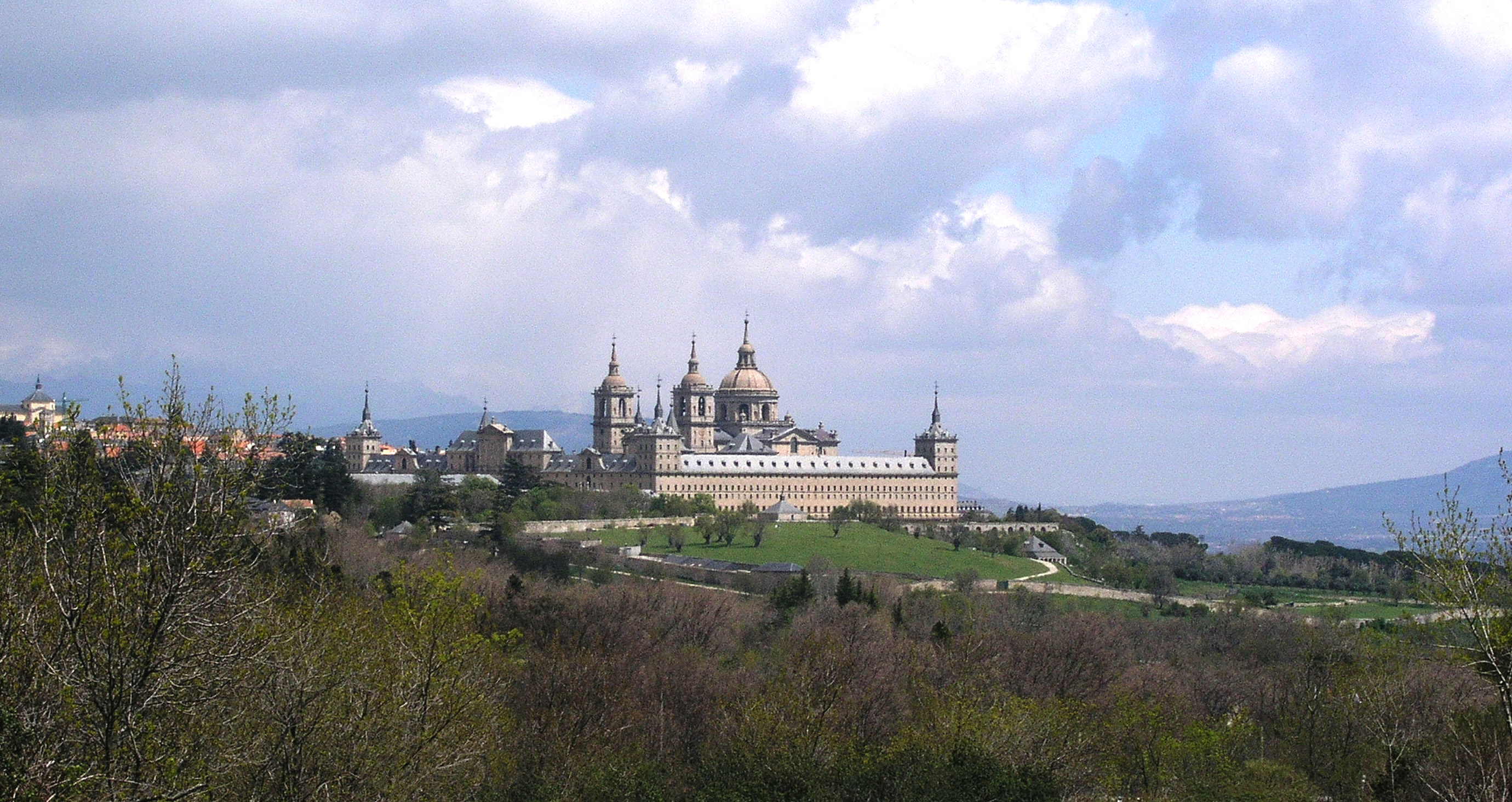 Monastery San Lorenzo de El Escorial, Madrid, Spain. Distant view.